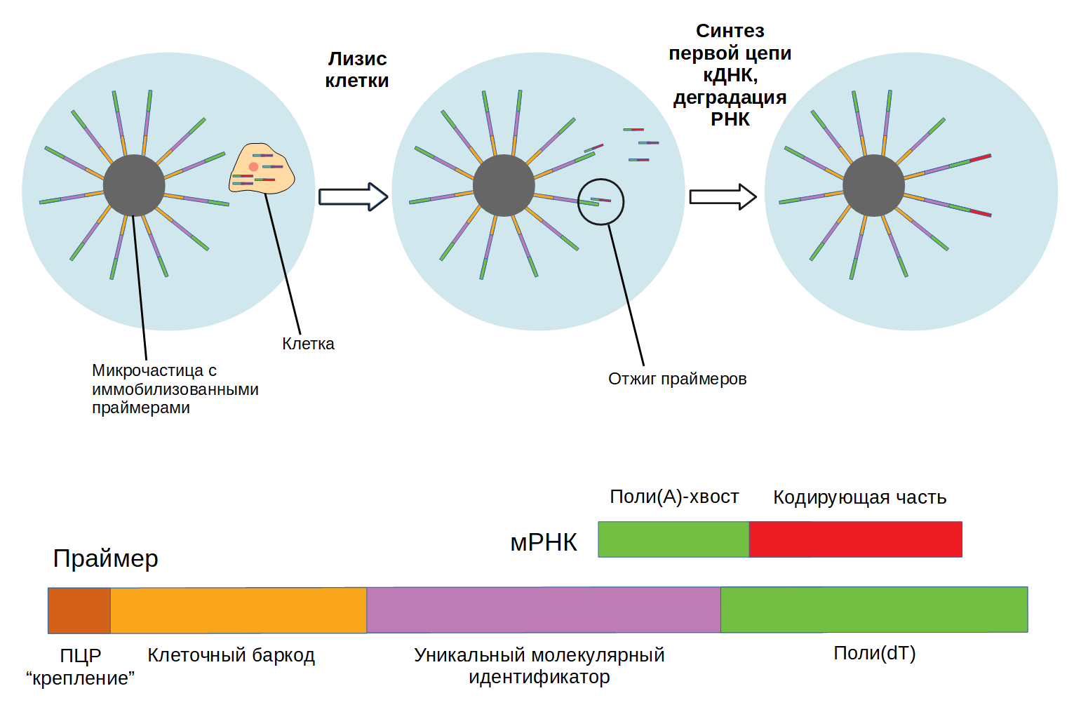 Структура микрочастицы с иммобилизованными праймерами, в последовательности которых зашифрованы клеточные баркоды и уникальные молекулярные идентификаторы (UMI).